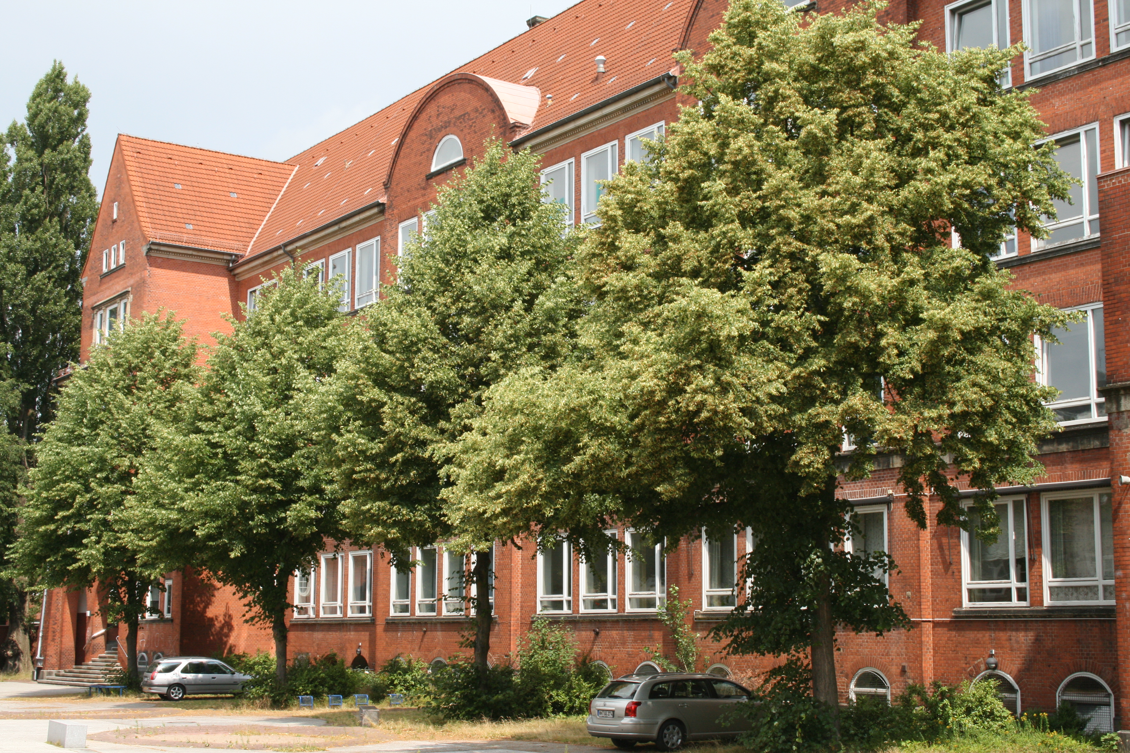 Ehemalige Realschule Weidenstieg Hauptgebäude, erbaut nach Plänen von Carl Johann Christian Zimmermann. Heute ist dort das Institut für Lehrerbildung untergebracht. This is a photograph of an architectural monument.